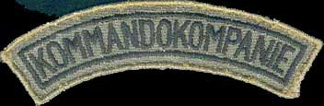 Ärmelaufnäher der Fallschirmjägerkompanien B1 der Bundeswehr